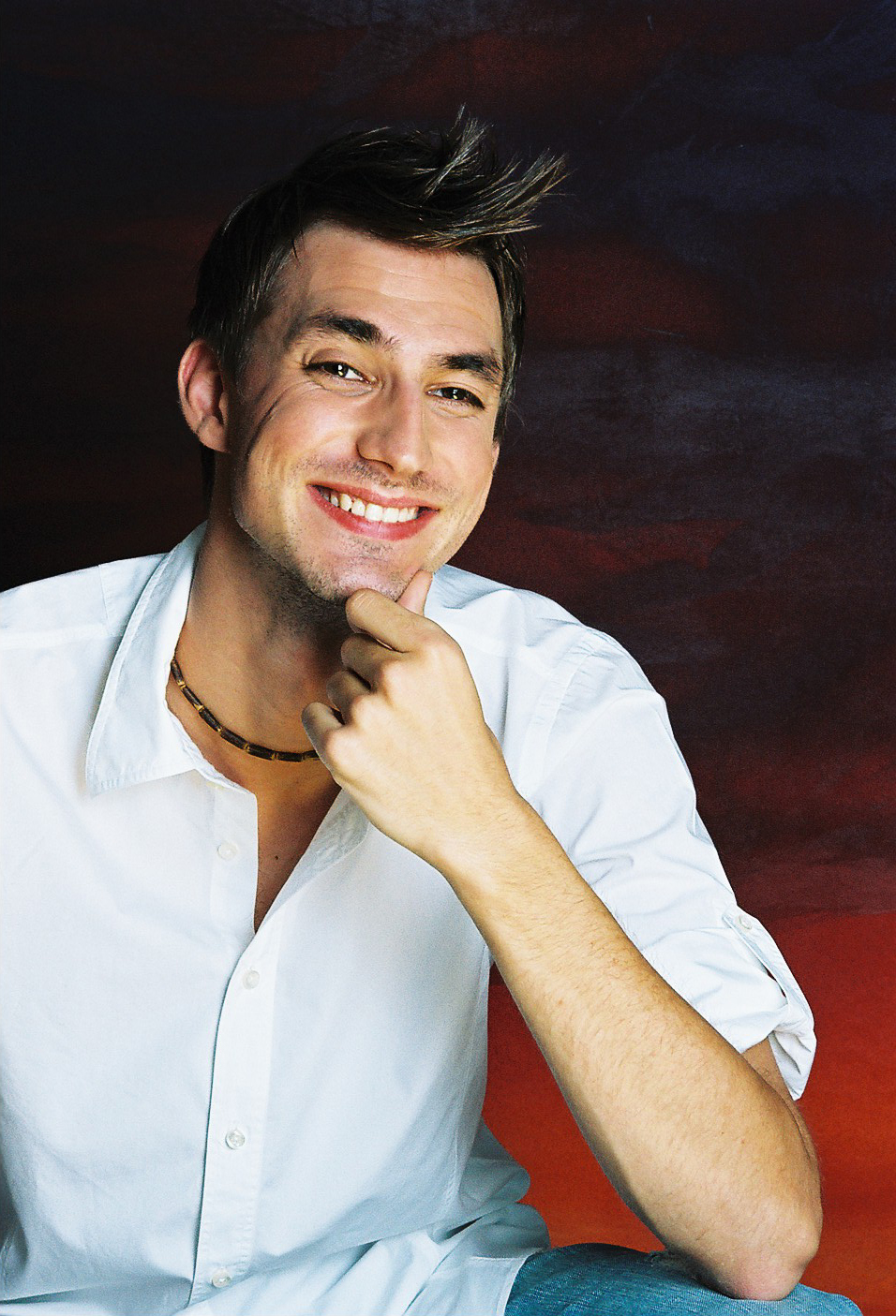 Daniel Barták (2006)